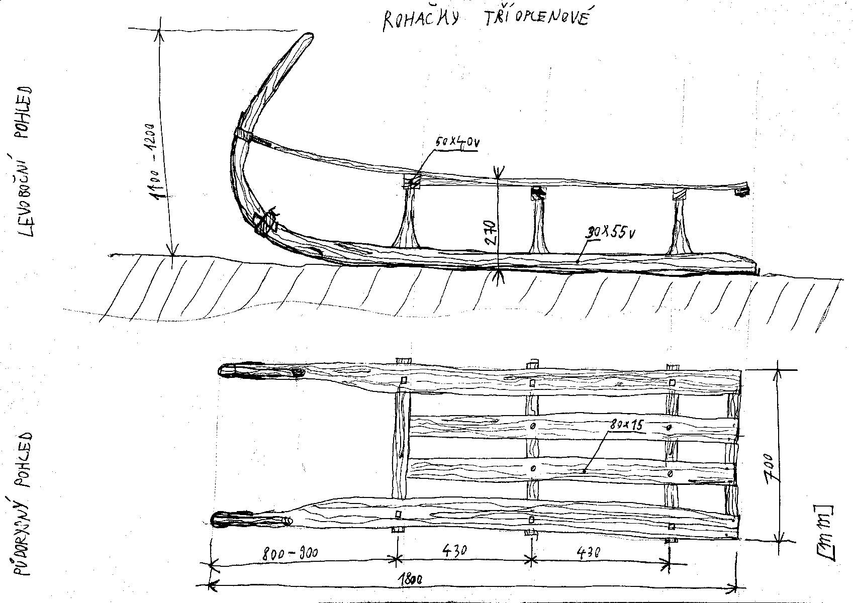 skica saní rohaček